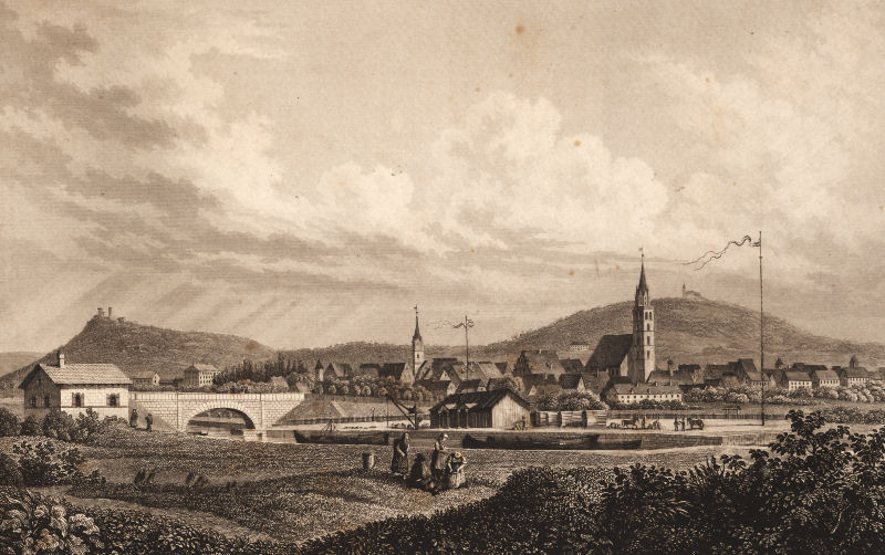 Kanalhafen von Neumarkt. Stahlstich von Alexander Marx aus dem Buch Pittoreske Ansichten des Ludwig-Donau-Main-Kanals. Gezeichnet, auf Stahl gestochen und herausgegeben von Alexander Marx. 1845. Kupferstecher in Nürnberg.